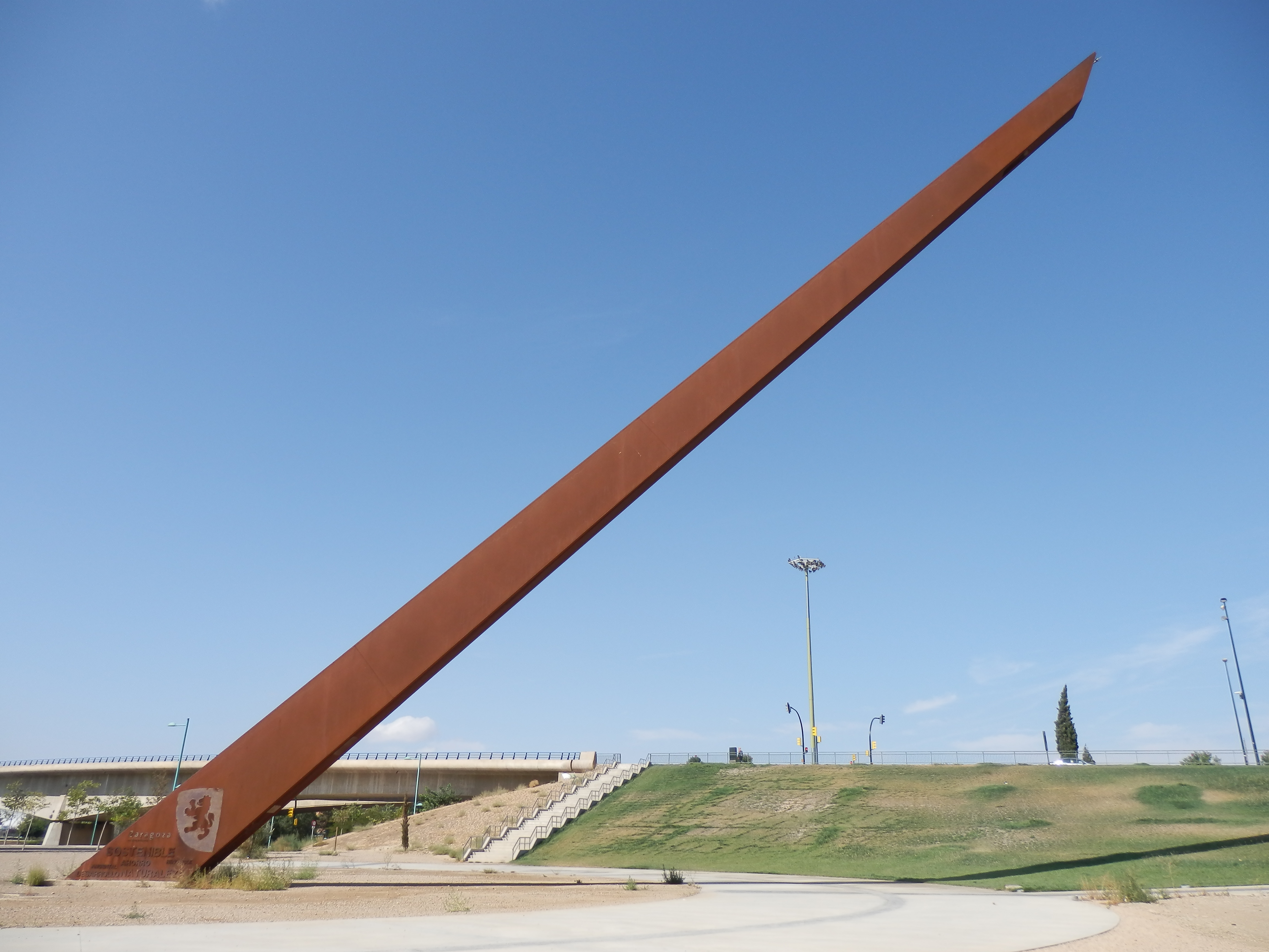 Reloj solar Multicaja-Zaragoza. En 2011 era el más grande del mundo.